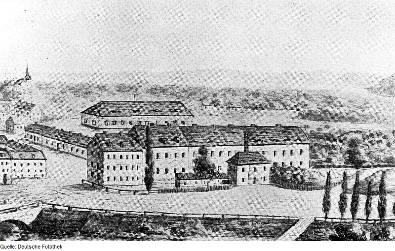 Original image description from the Deutsche Fotothek Dresden-Plauen. Bienertmühle (frühere Hofmühle) 1852, aus: Meiche 1927